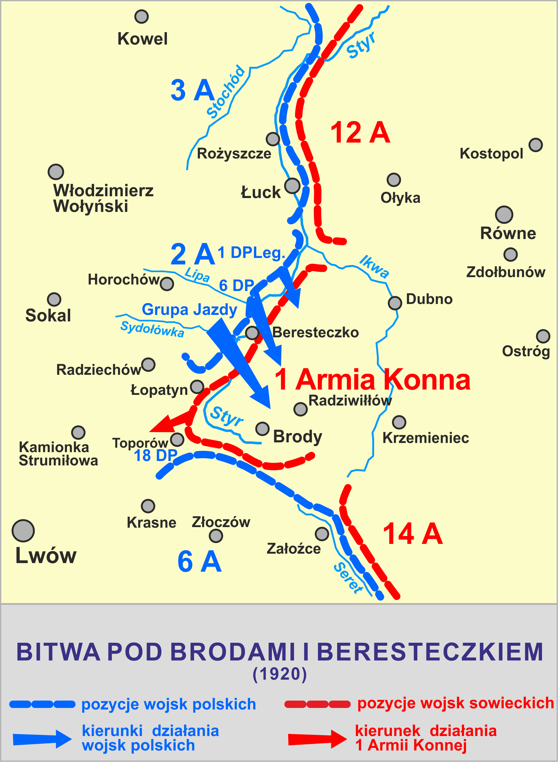 Bitwa pod Brodami 29.07-03.08-1920